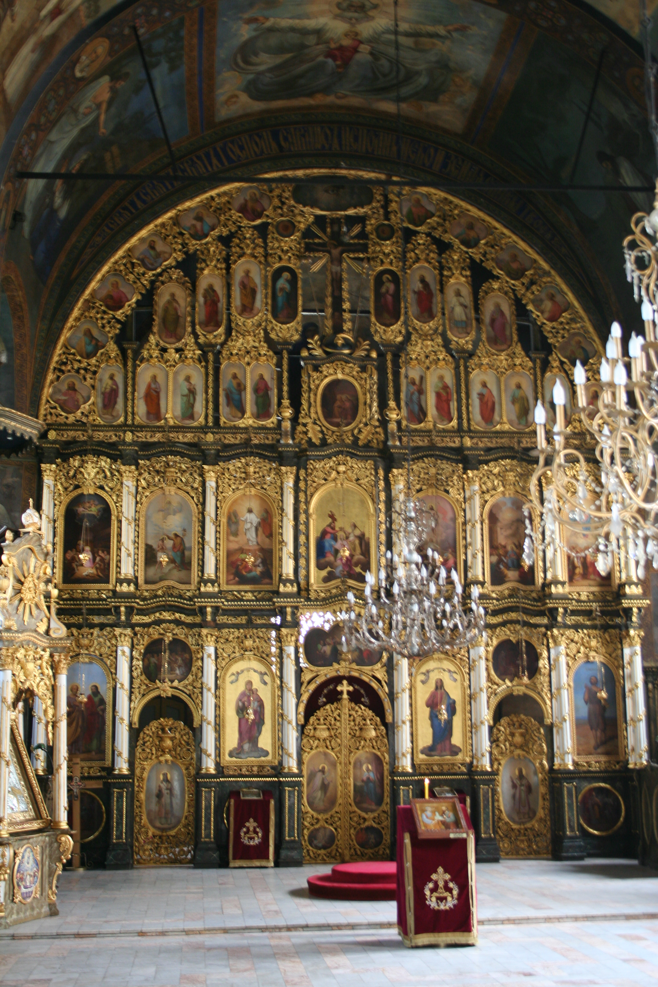 Saborna crkva Sv. Petra i Pavla, Šabac-Ikonostas